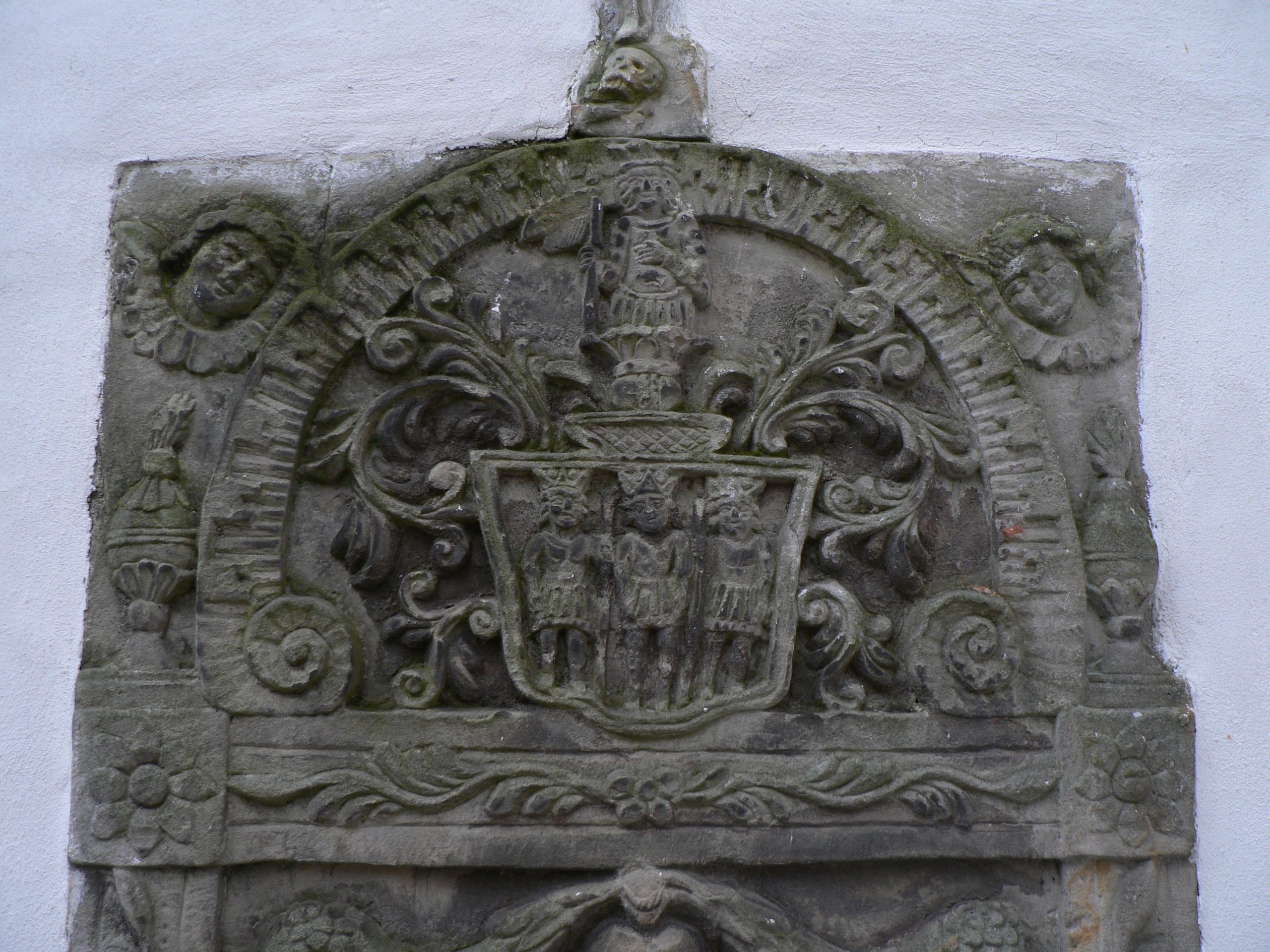 Kostel svatého Stanislava (Mohelnice), klasicistní náhrobek